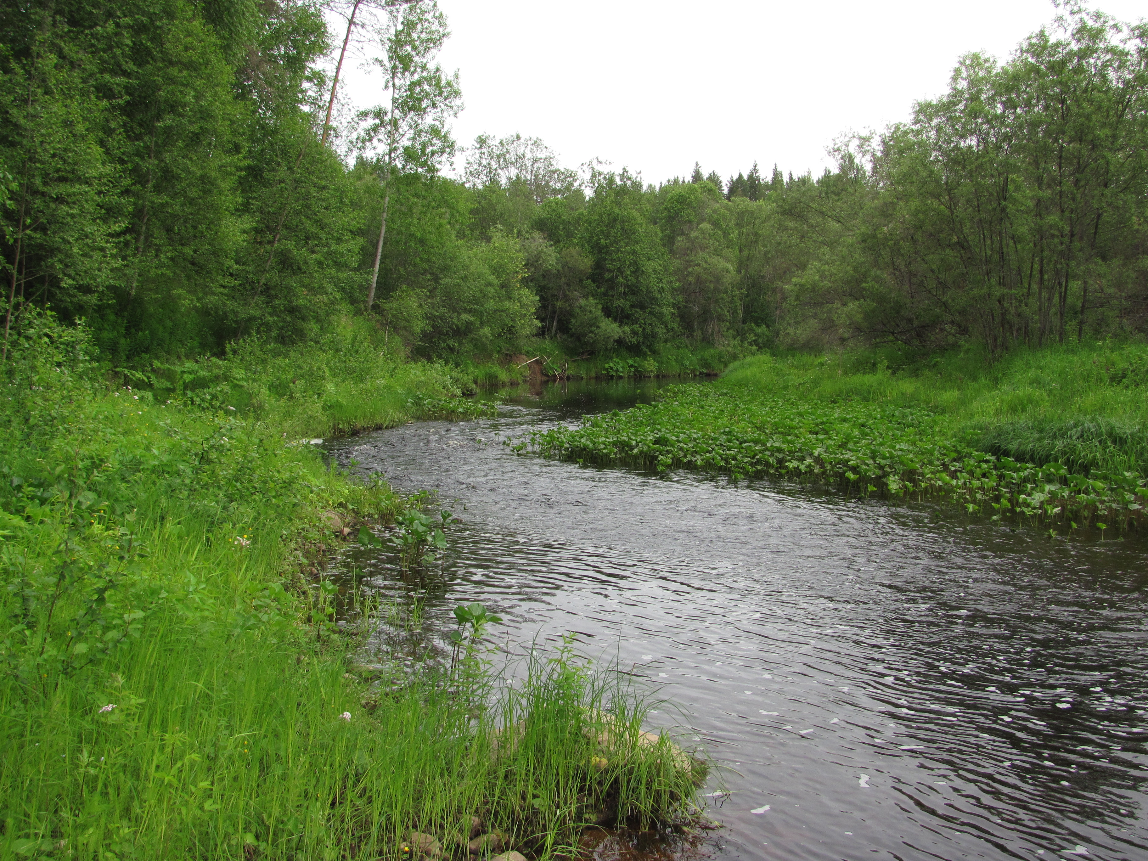 перекат на реке Елюга, недалеко от поселка Хозьмино